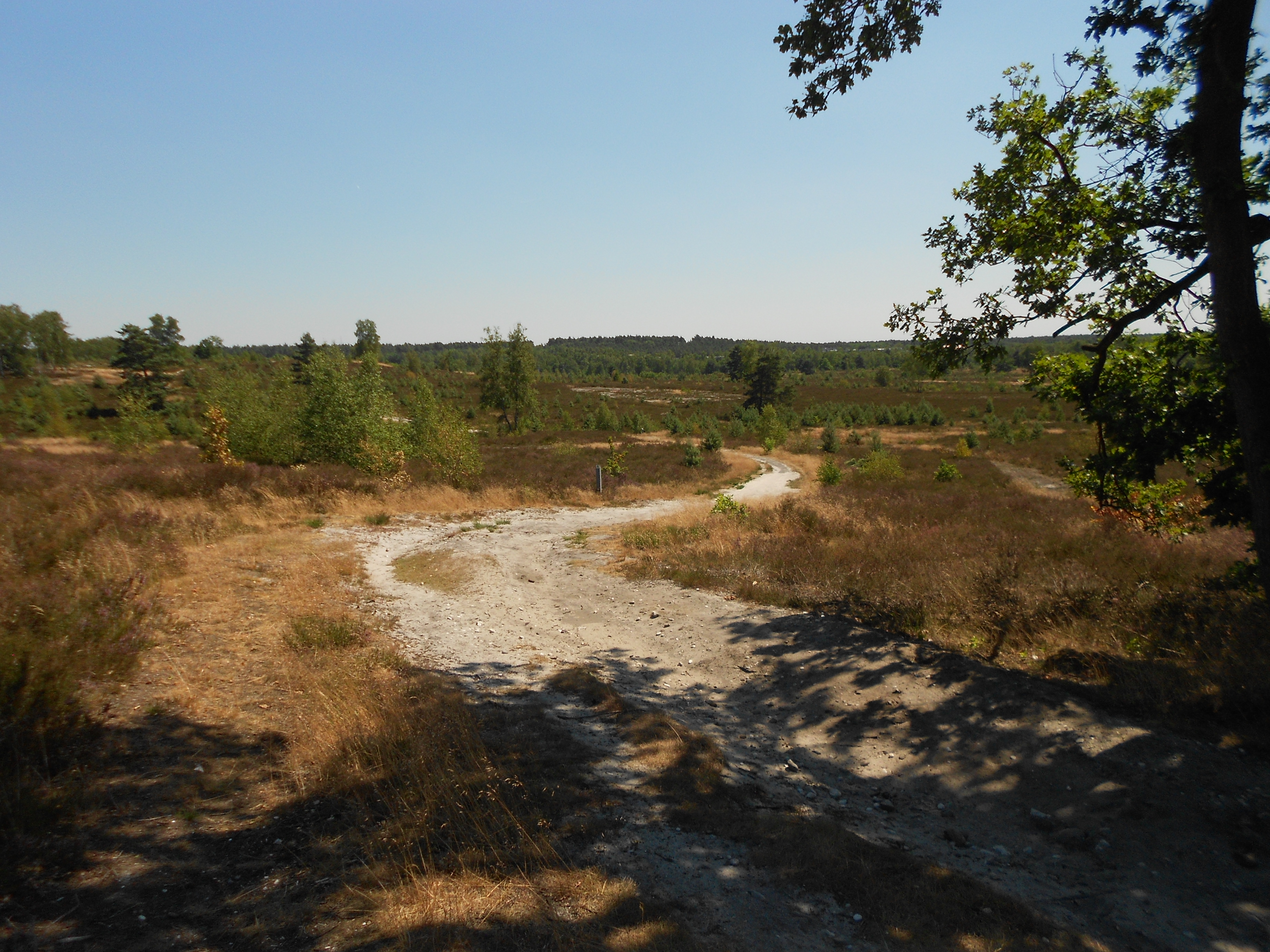 Heidelandschap in de Limburgse Kempen (België).